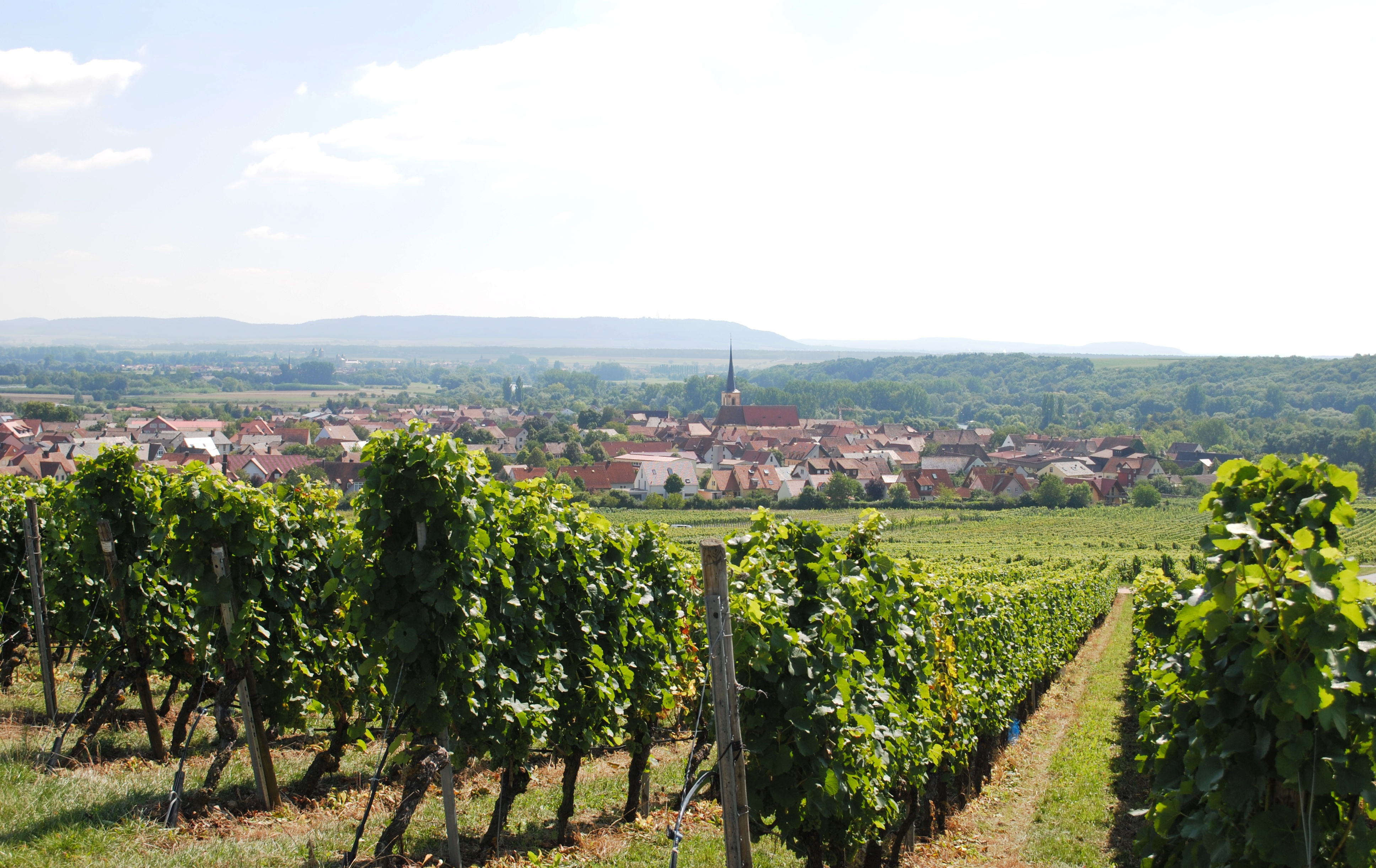 Panorama, Kreuzberg, SommerachThis is a photograph of an architectural monument.